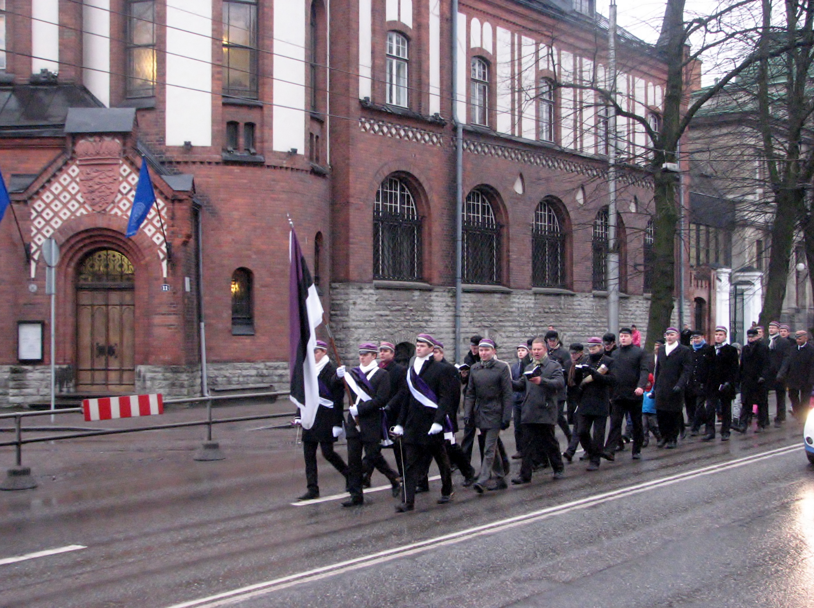 Korporatsioon Vironia liikmed rongkäigus Õppursõdurite monumendi juurde